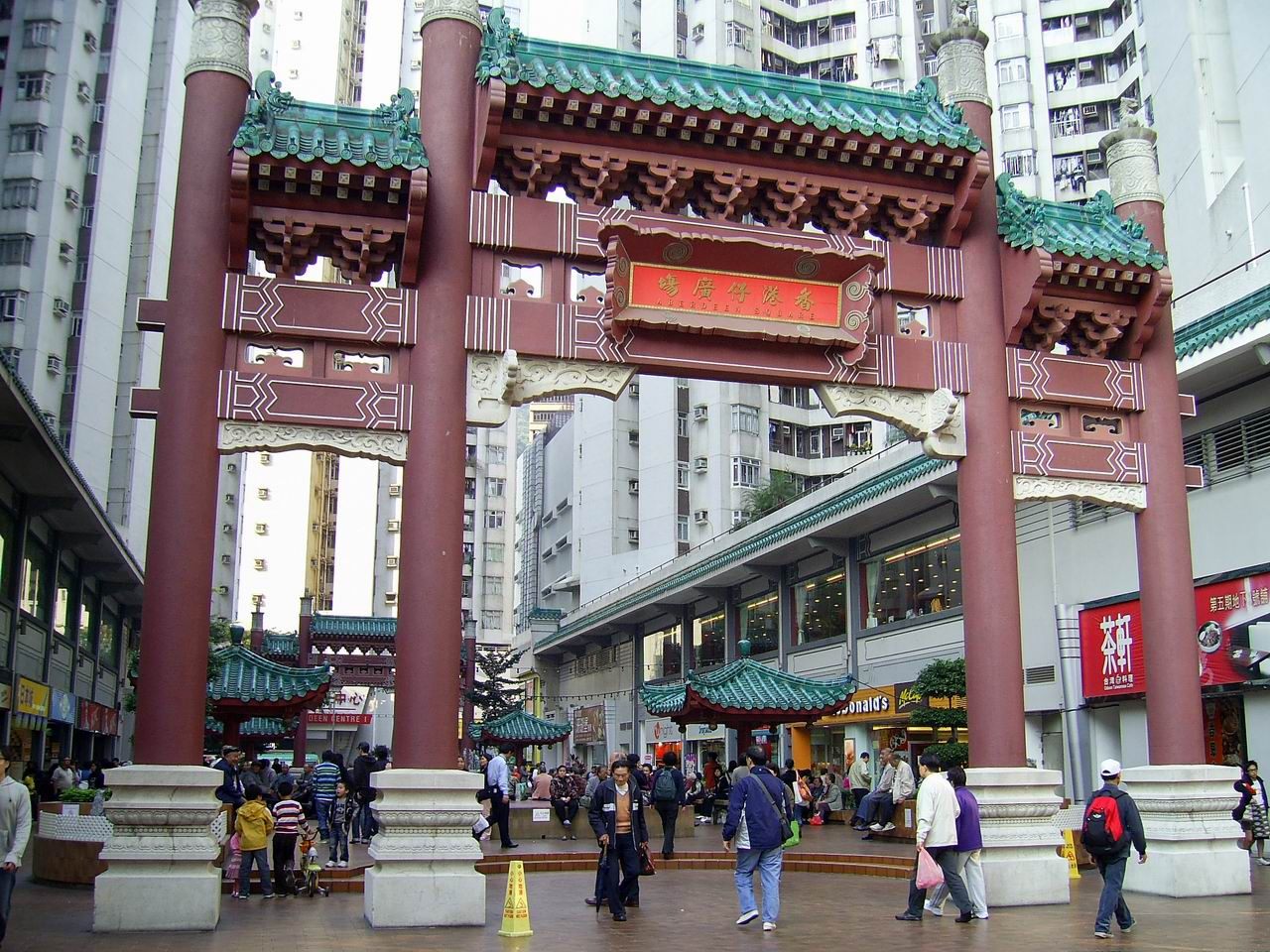 香港仔廣場的牌坊